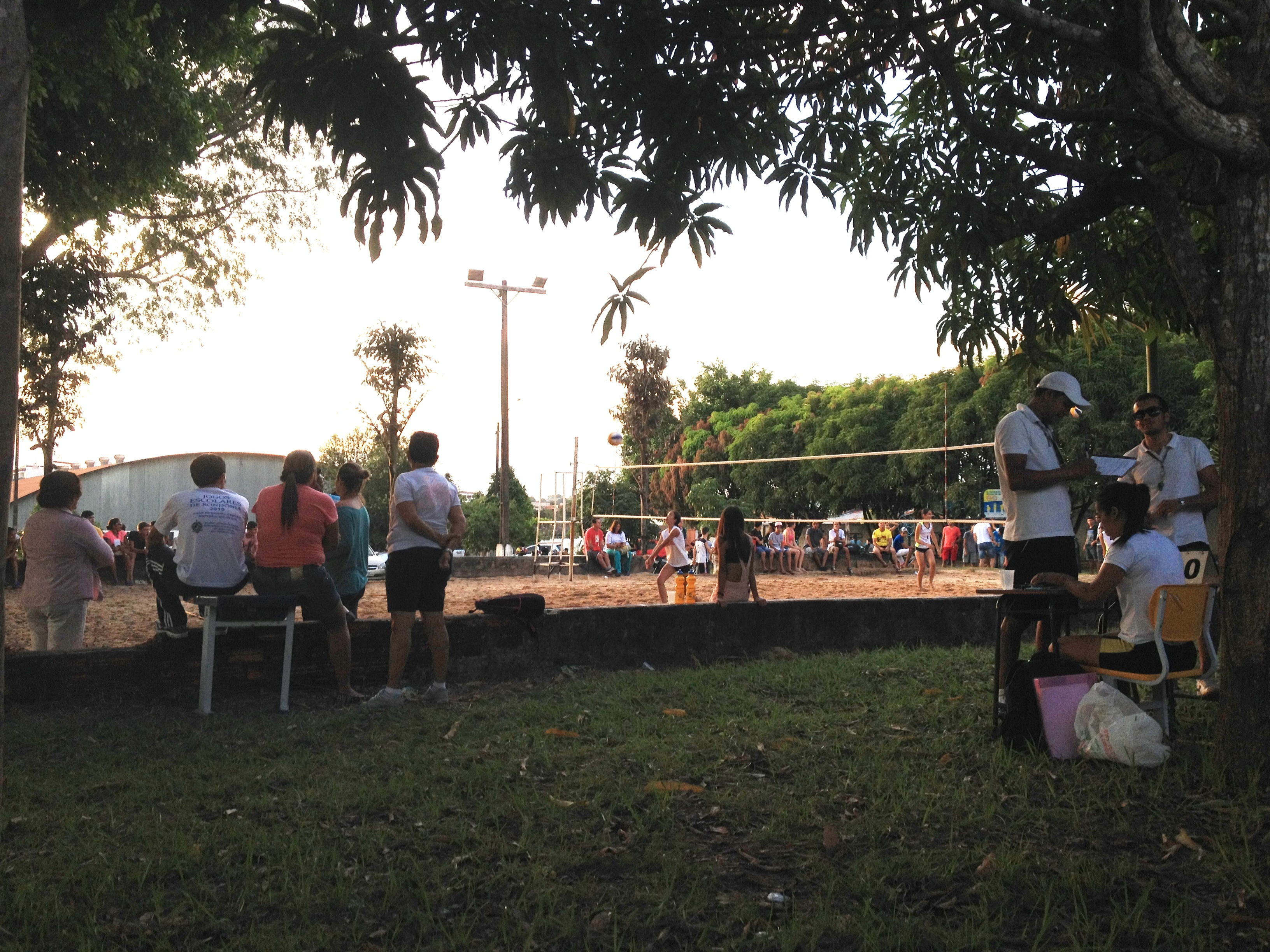 Quadra de Areia do Estádio Municipal Luizinho Turatti durante a Fase Regional dos Jogos Escolares de Rondônia 2015, em Espigão do Oeste.